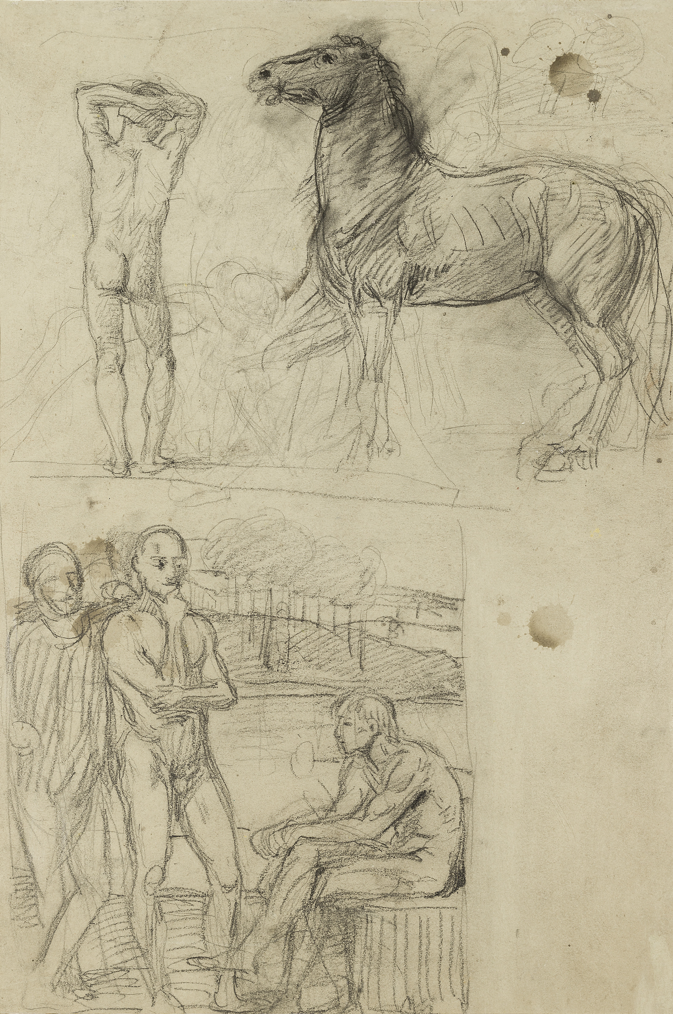 Figürliche Kompositionen von Hans von Marées, Schwarze Kreide auf Papier, 34,5 x 29 cm.